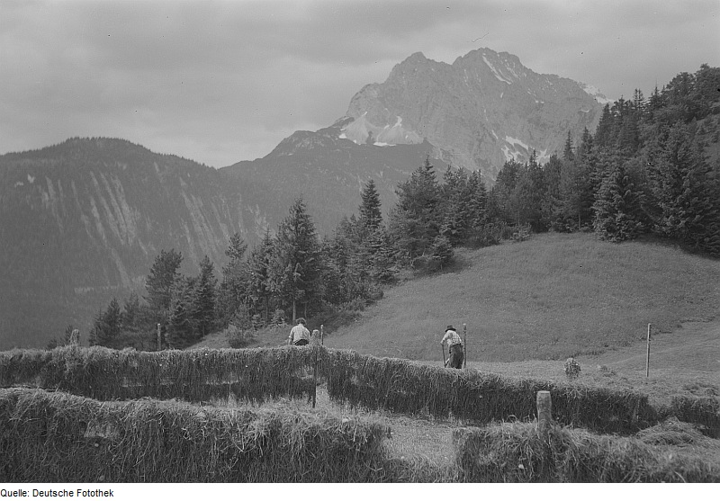 Original image description from the Deutsche FotothekWettersteingebirge